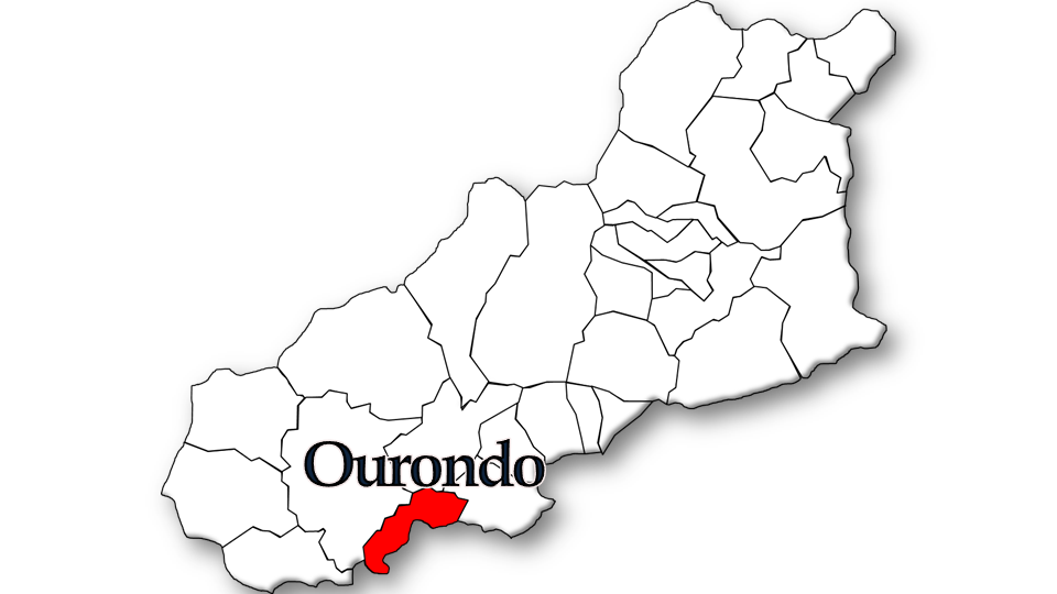 População